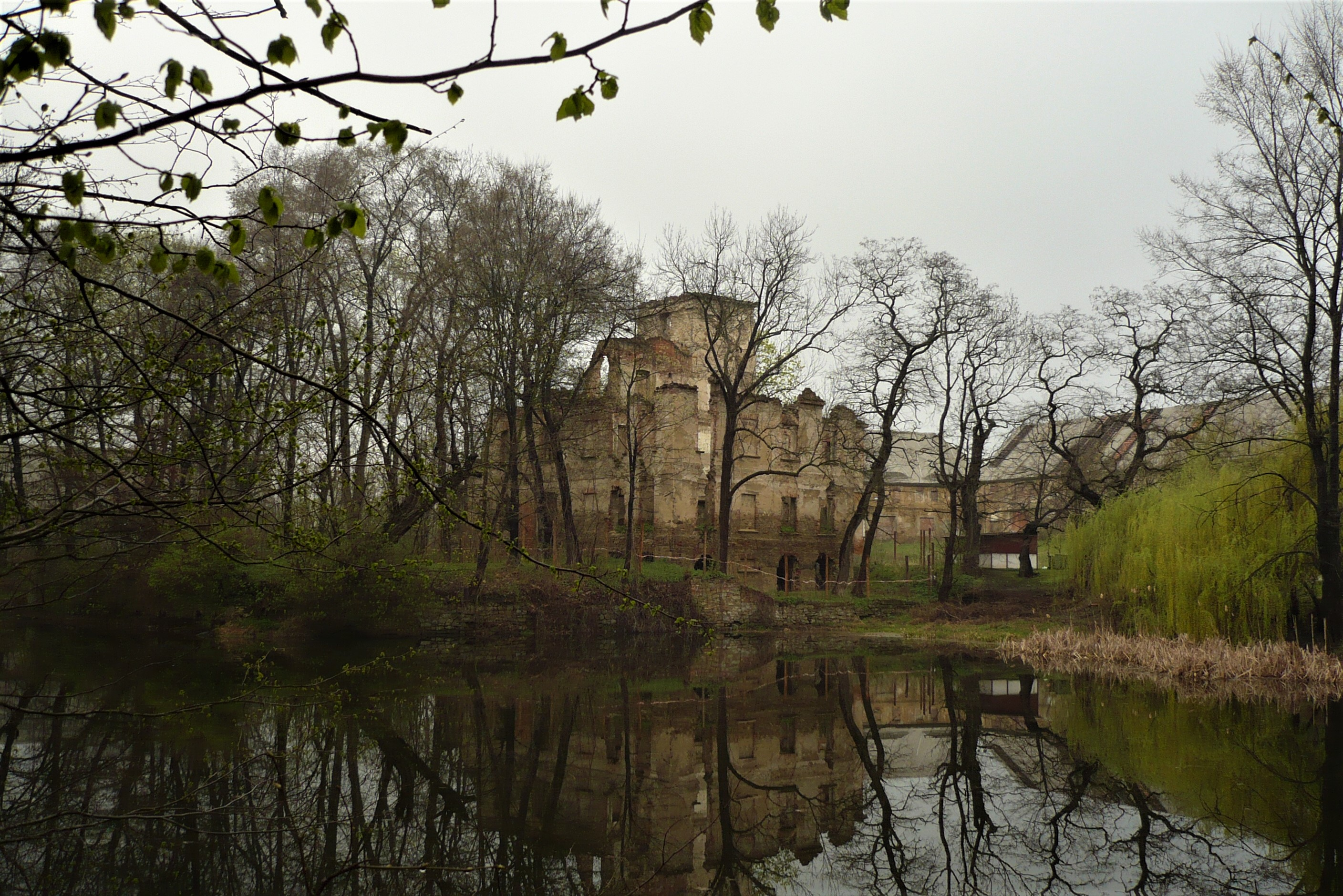 Pałac w Sulisławicach